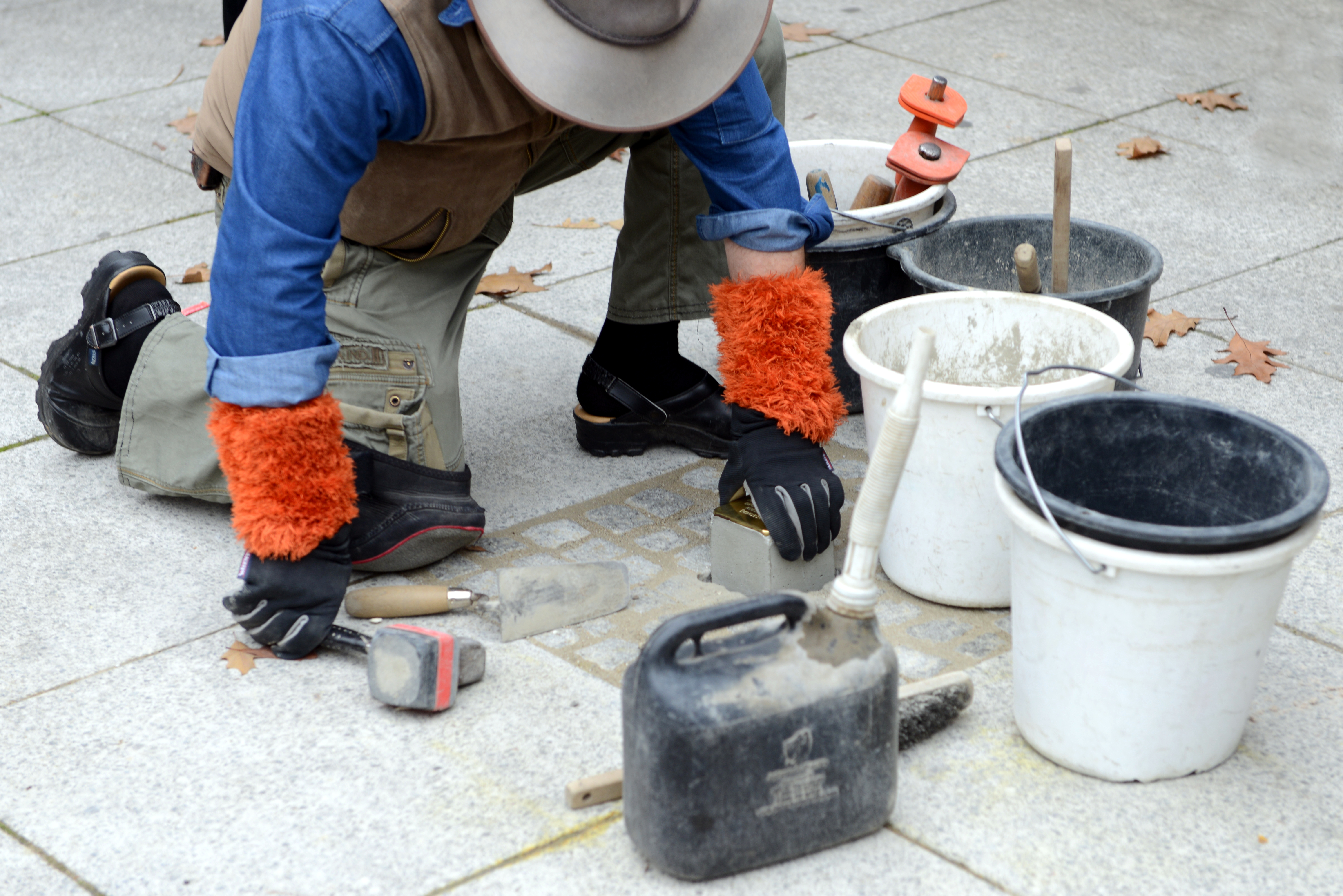 De Gunter Demnig leet de Stolperstee fir de Gustave Wolf. 30, avenue de la Liberté zu Déifferdeng. Op där Adress hat de Gustave Wolf säi Geschäft d'"Maison Moderne", dat en 1938 vum Émile Lazard iwwerholl hat. De Gustave Wolf gouf 1943 a Frankräich verhaft an an d'Internéierungslager zu Drancy bei Paräis verschleeft. Vun do koum hien am November mam "63. Osttransport" op Auschwitz wou hien ëmbruecht gouf.